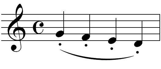 Portato